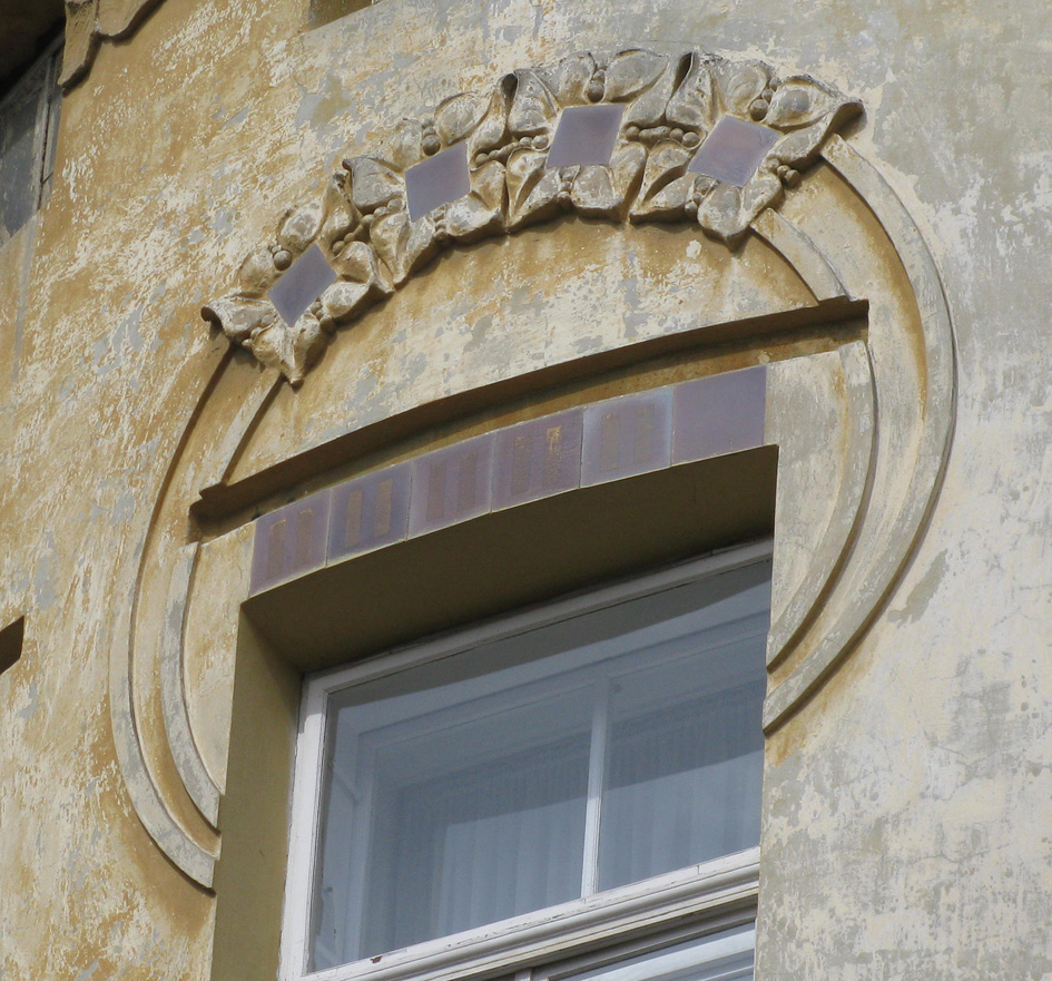 Будинок по вулиці Богомольця, 3 (Львів). Запроектований архітектурно-будівничим бюро Івана Левинського.